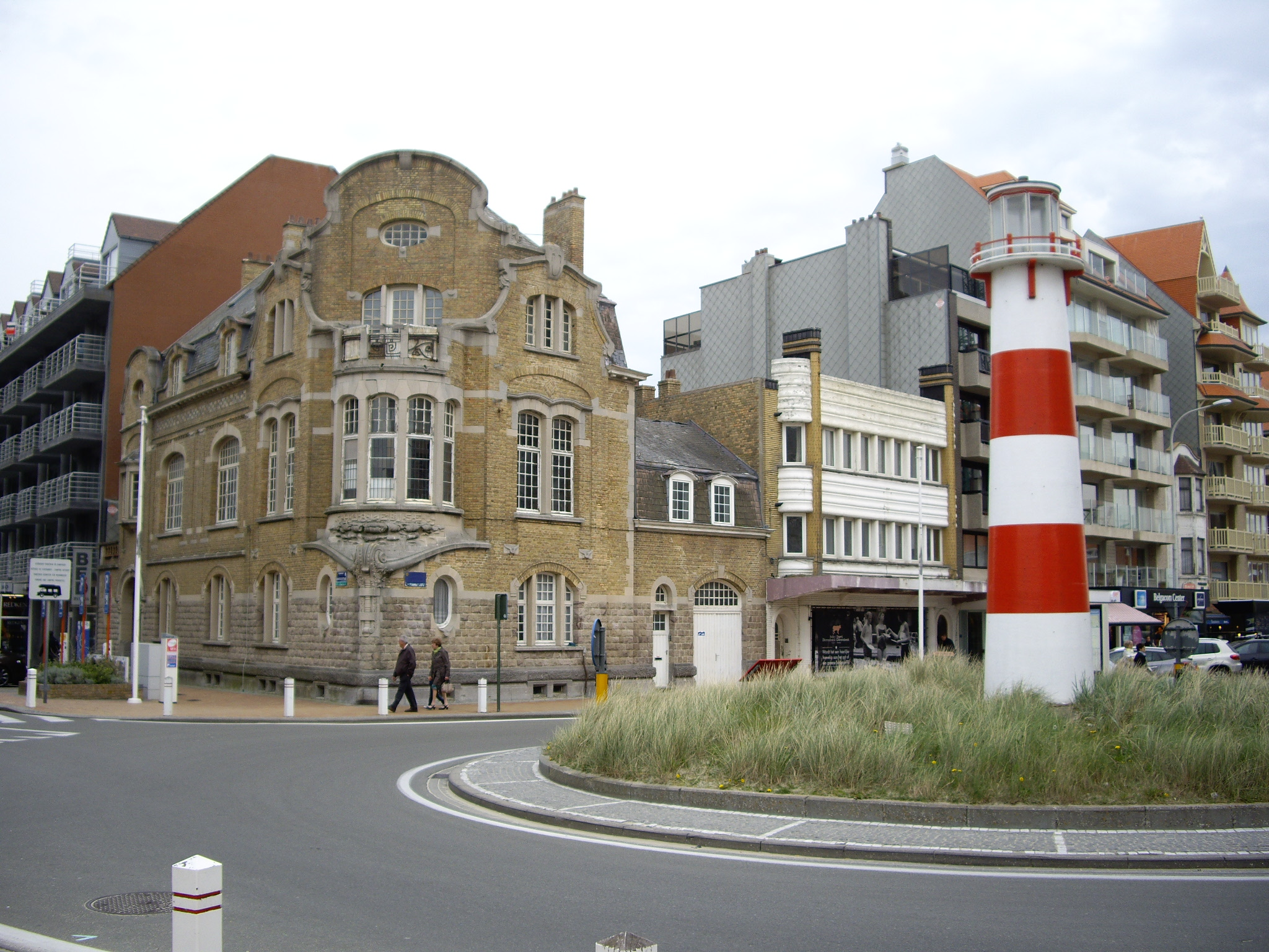 Hiriko toki bat